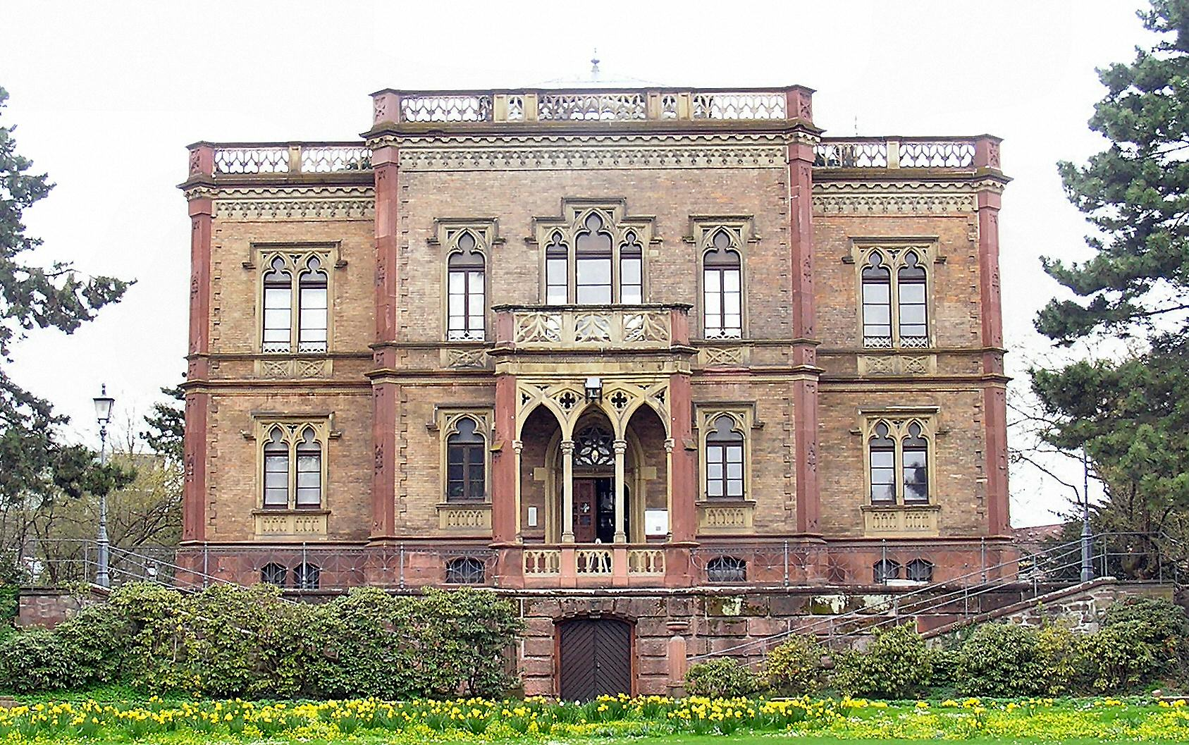 Colombischlösschen von vorne (Freiburg im Breisgau Germany)